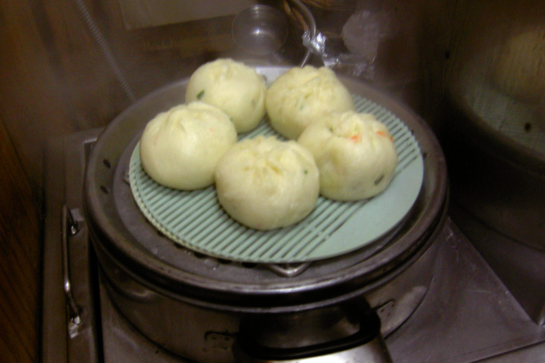 Nov 23, 2006 at 22:36 KST (龍仁市/용인시)